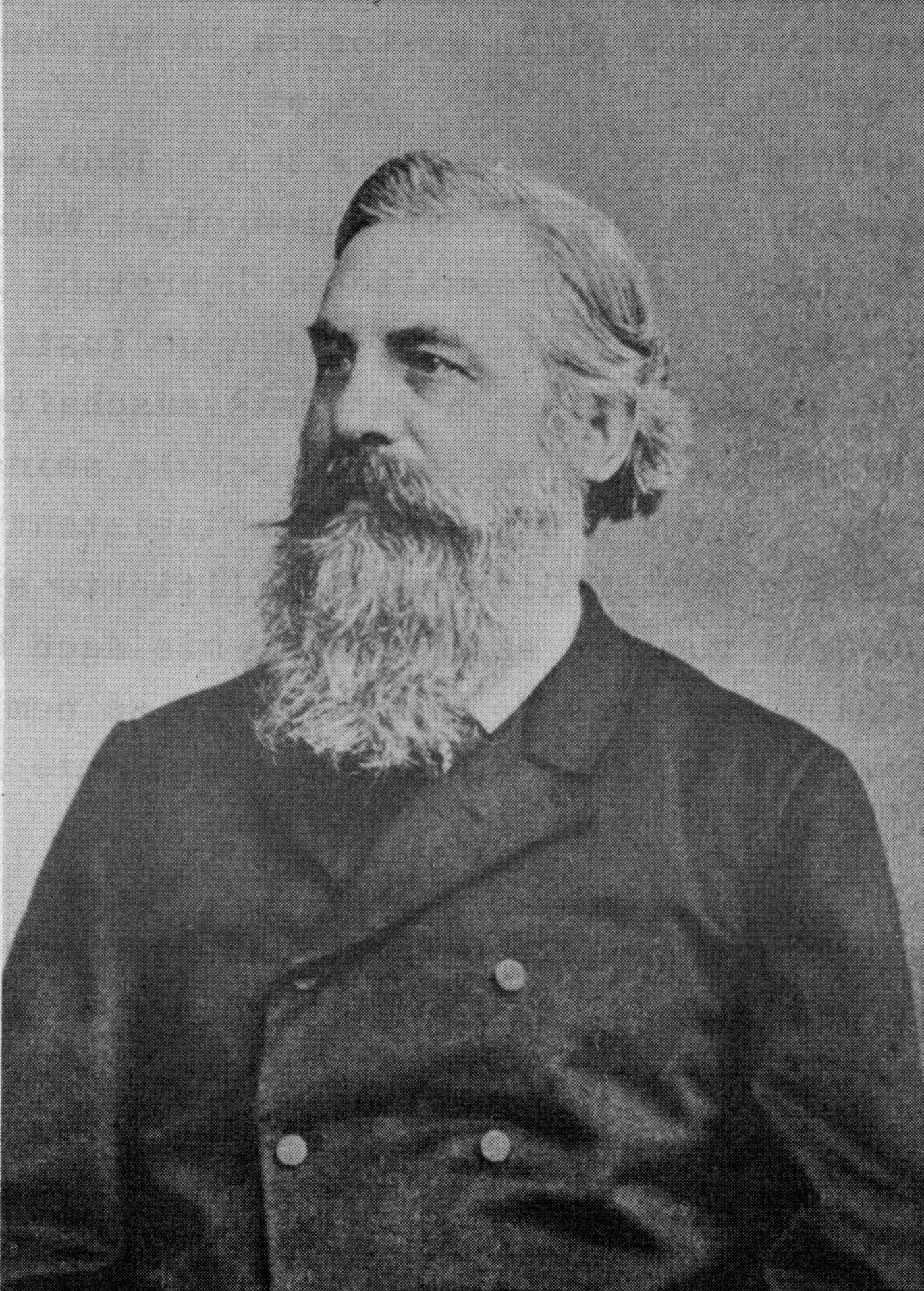 Johannes Adolf Wislicenus (* 24. Juni 1835 in Kleineichstädt; † 5. Dezember 1902 in Leipzig), als neuer Vorstand des Chem. Instituts in Leipzig.